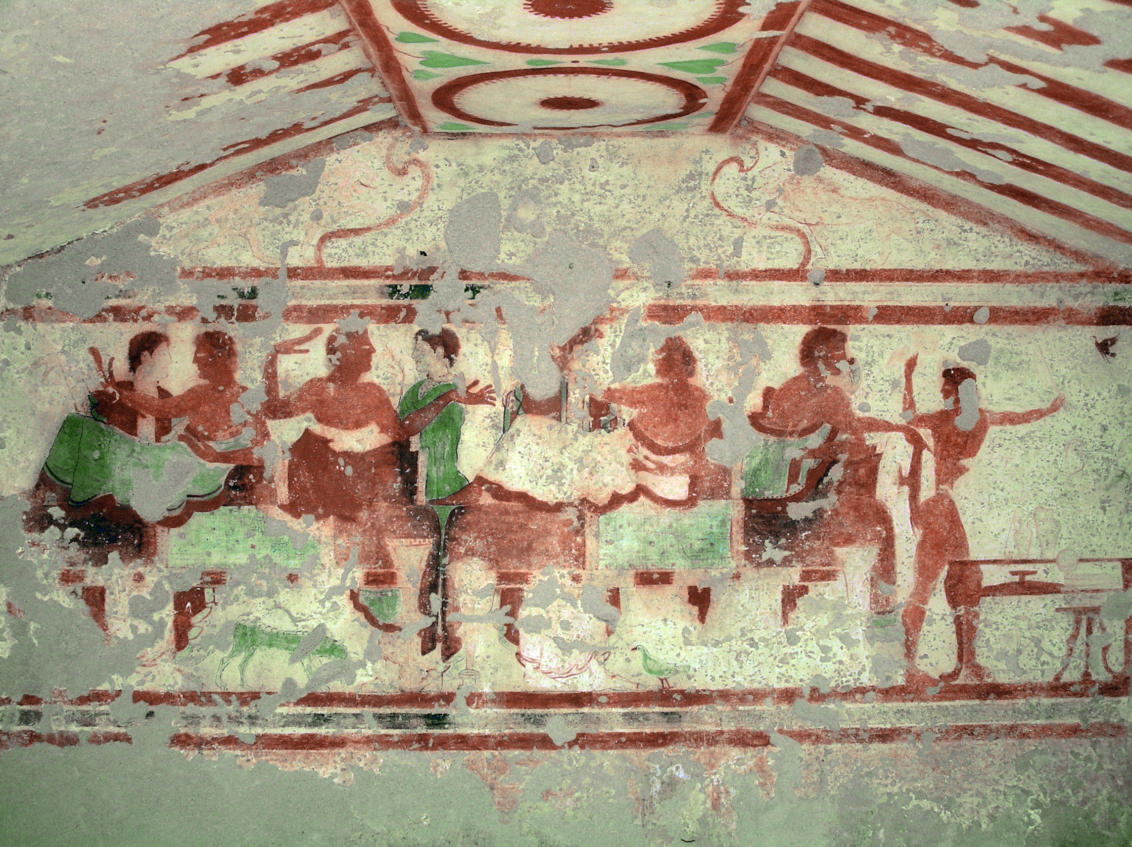 Wandmalerei im Grab "5513", einer unterirdischen Grabkammer der etruskischen Nekropole von Tarquinia, Italien